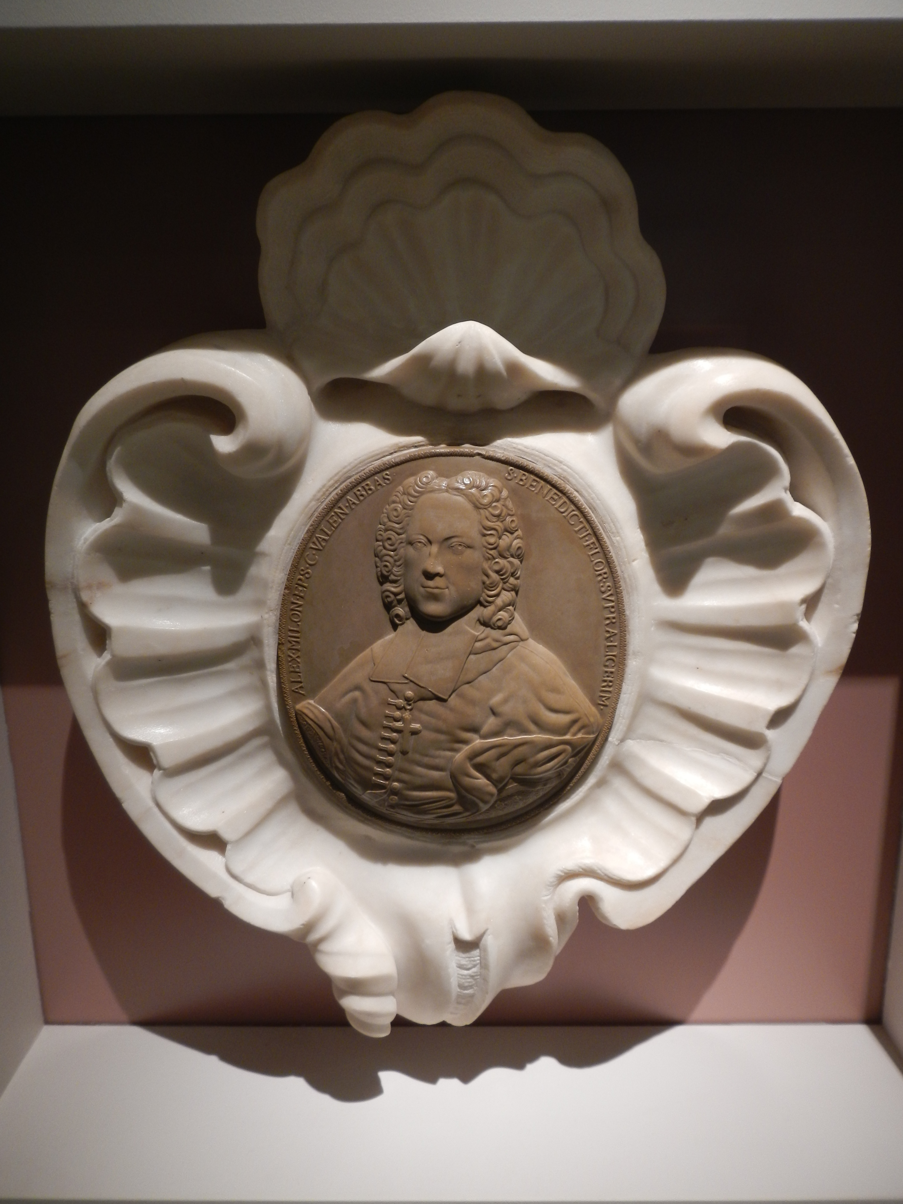 Dans le Musée de Valence (Dôme), Médaillon d'Alexandre Milon, évêque.